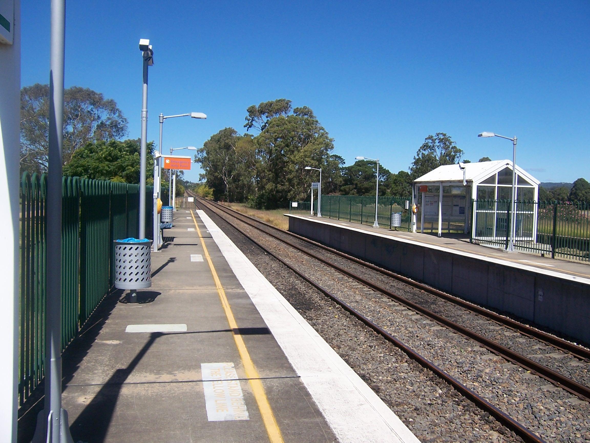 Menangle Park Station